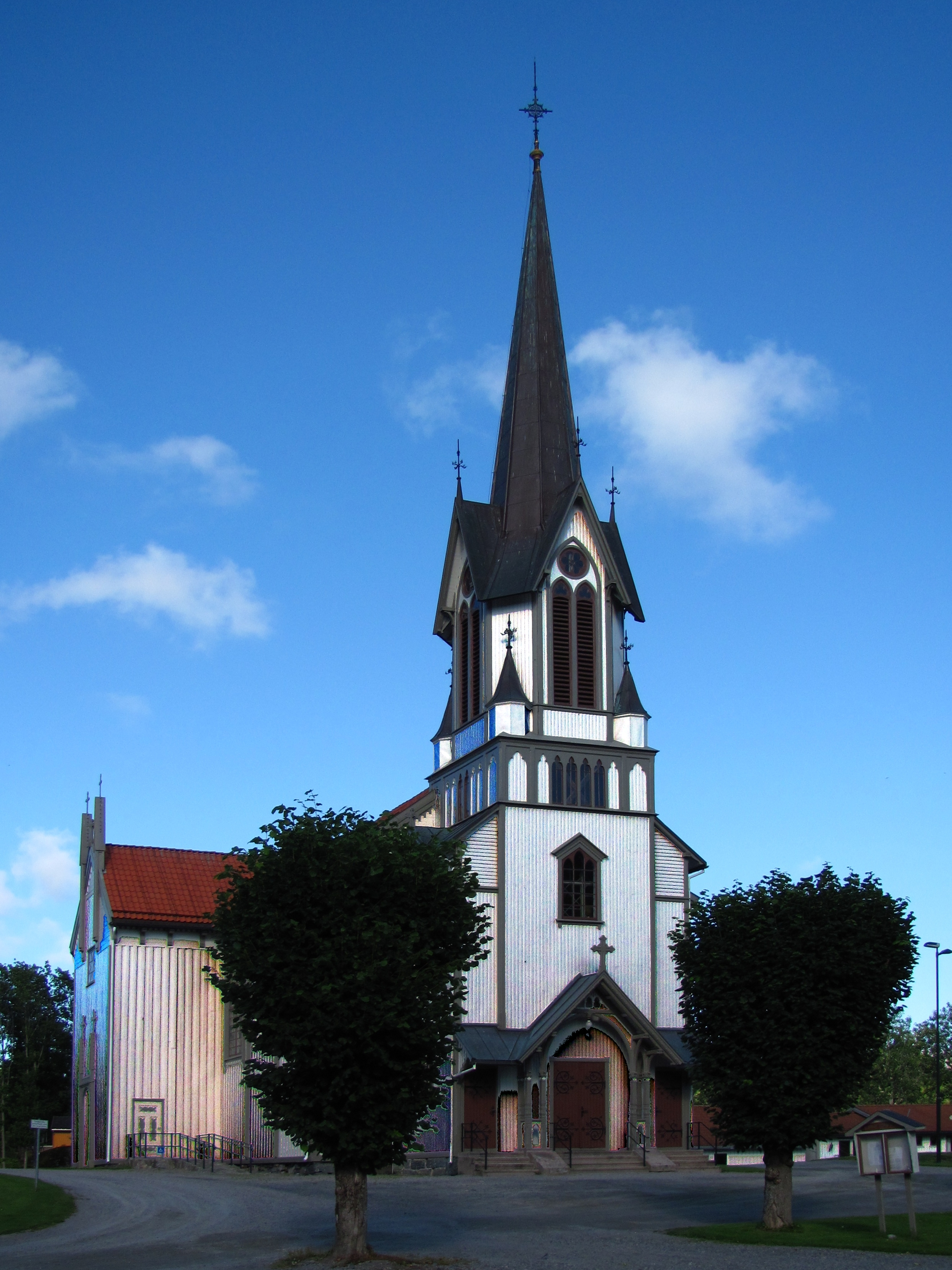 Bamble kirke bygd 1843 i Bamble kommune, Telemark. Agder og Telemark bispedømme; Bamble prosti. Kirken er en tømret korskirke, arkitekt Gustav Adolph Lammers.